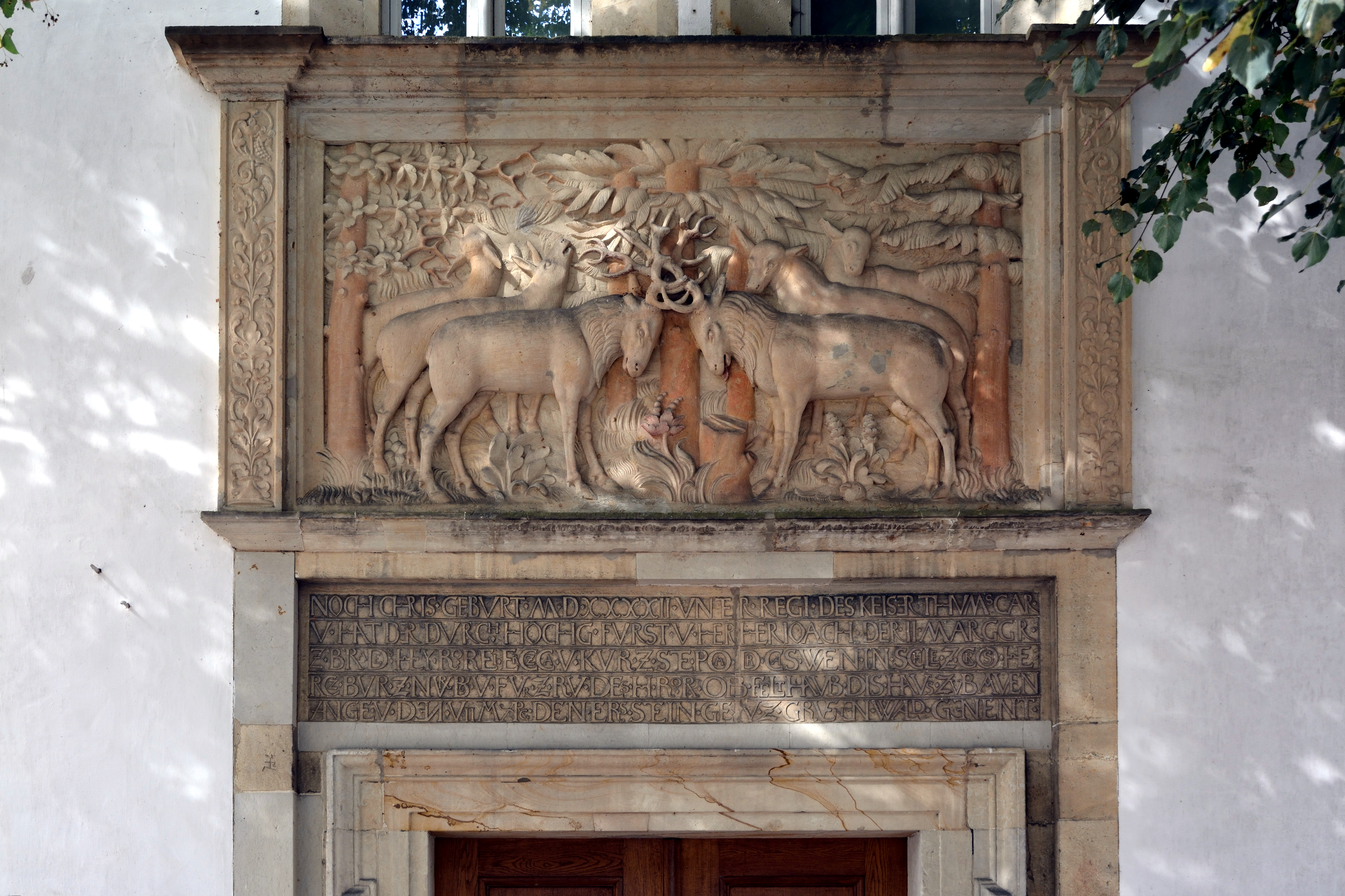 Impressionen aus dem Jagdschloss Grunewald.Hier: Hirschrelief über dem EingangBeschreibung nach File:Hirschrelief Grunewald.jpg:NOCH CHRIS[TI] • GEBVRT • M D • XXXXII • VN[TER] • [D]ER REGI(ERUNG) • DES KEISERTHMVMS CAR[LS] • V • HAT DER DVRCH[LAUCHTIGSTE] HOCHG[EBORENE] • FVRST • V[ND] • HER[R] HER[R] JOACH[IM] • DER • II • MARGGR[AF] • Z[U] • BRA[N]DE[NBURG] [DE]S • HEY[LIGEN] • RO[EMISCHEN] • REI[CHES] • ERCZCA[EMMERER] • V[ND] • KVR[FÜRST] • Z[U] • STE[TTIN] • POM[MERN] • D[E]R • CAS[SUBEN] • WEN[DEN] • IN • SCHLE[SIEN] • Z[U] • CHROS[SEN] • HERZCZ[OG] • BVR[GGRAF] • Z[U] • NVR[N]B[BERG] V[ND] • FVR[ST] • Z[V] • RV[EGEN] • DES • H[EILIGEN] • RO[EMISCHEN] • R[EICHES] • OB[ERSTER] • FELTHAVB[TMANN] • DIS • HAVS • ZUBAVEN • ANGE[FANGEN] • V[ND] • DEN • VII MARC[IUS] • DEN • ERS[TEN] • STEIN • GE[LEGT] • V[ND] • Z[UM] • GRVENEN • WALD • GENENT •